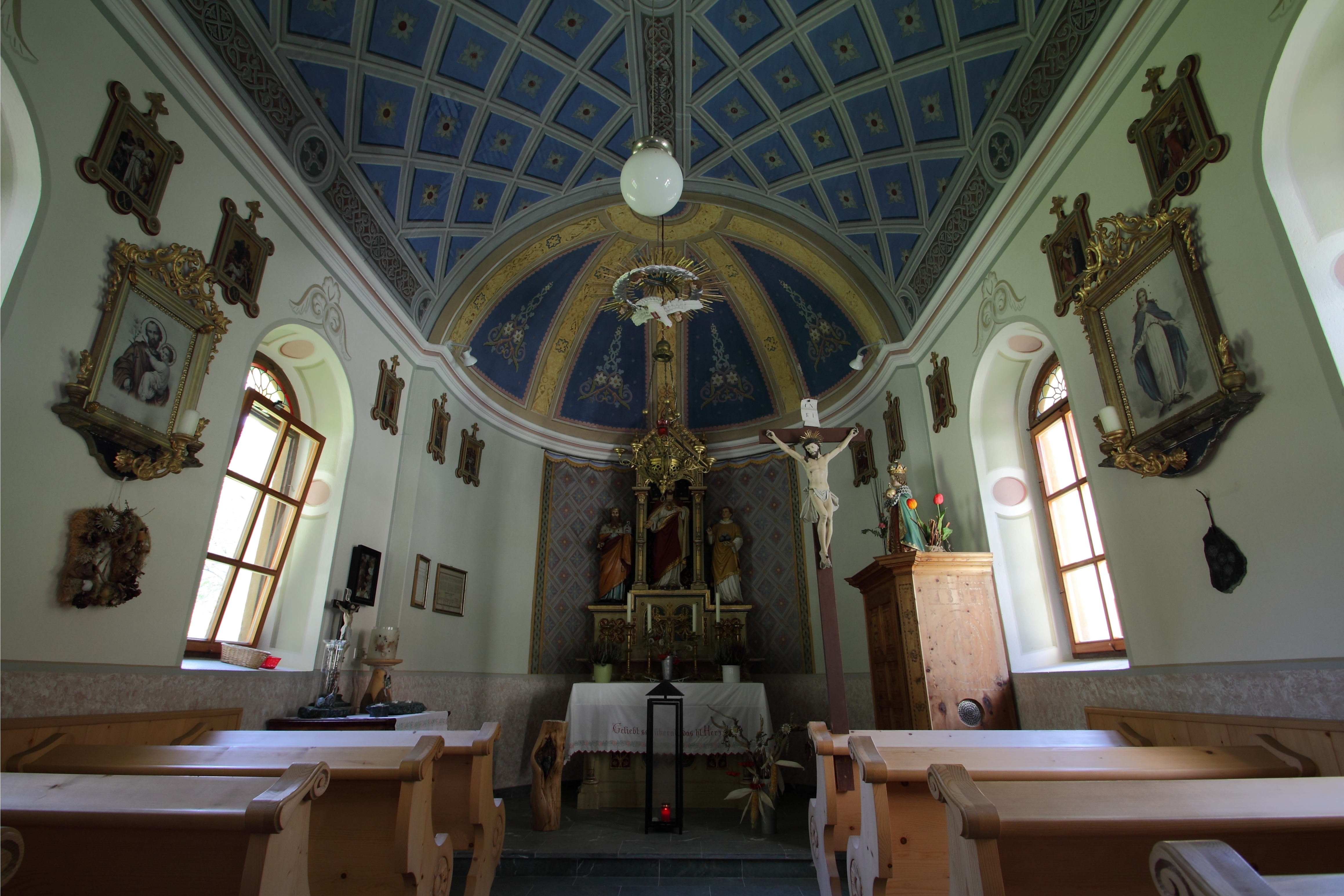 Innenansicht der Herz Jesu Kapelle in Ströden (Bezirk Lienz)